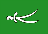 Summary Drapeau de la principauté de Banganapalle Source Nataraja Statut Nataraja Catégorie:Drapeau de principauté des Indes